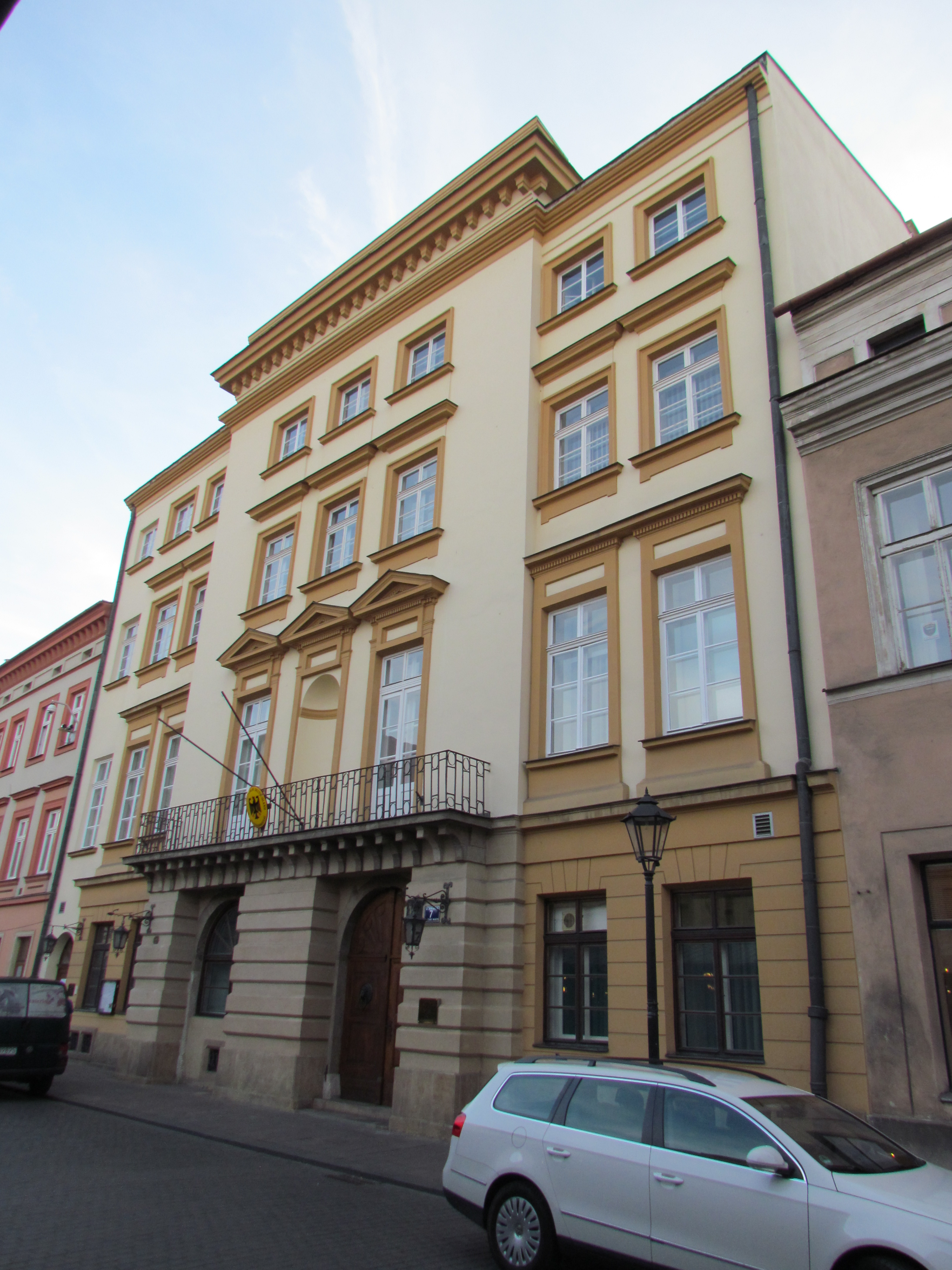 kamienica z oficyną Kraków, ul. Stolarska 7, Kraków